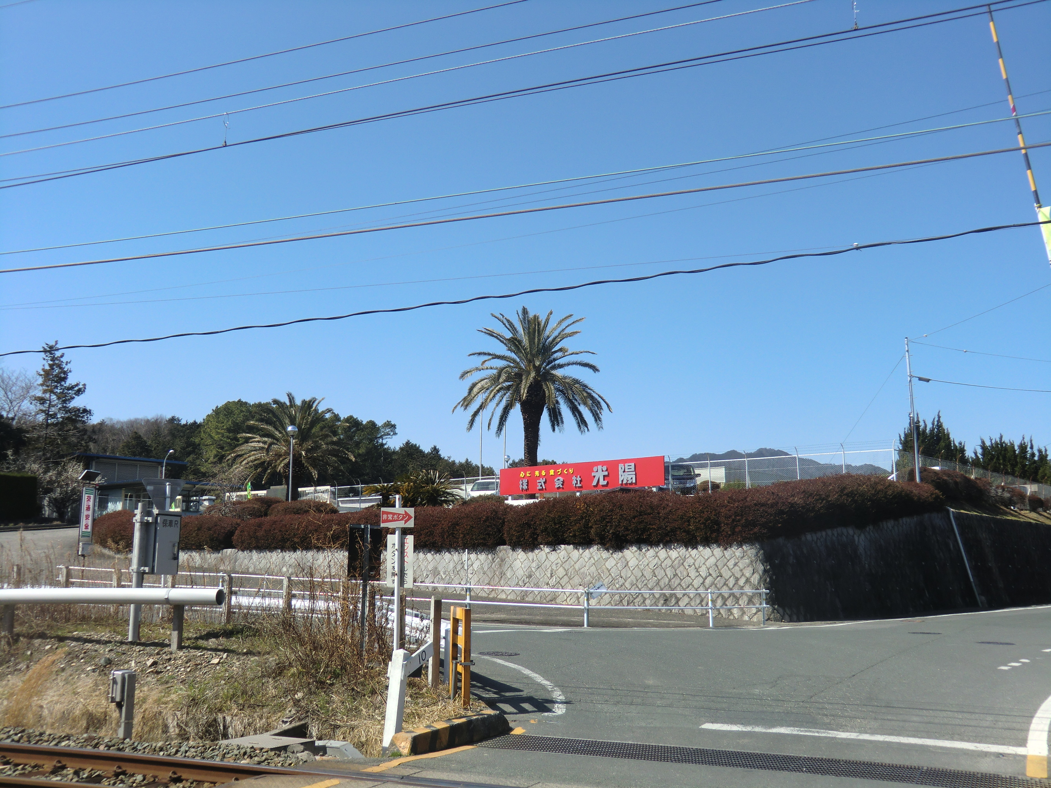 株式会社光陽一宮工場。愛知県豊川市上長山町